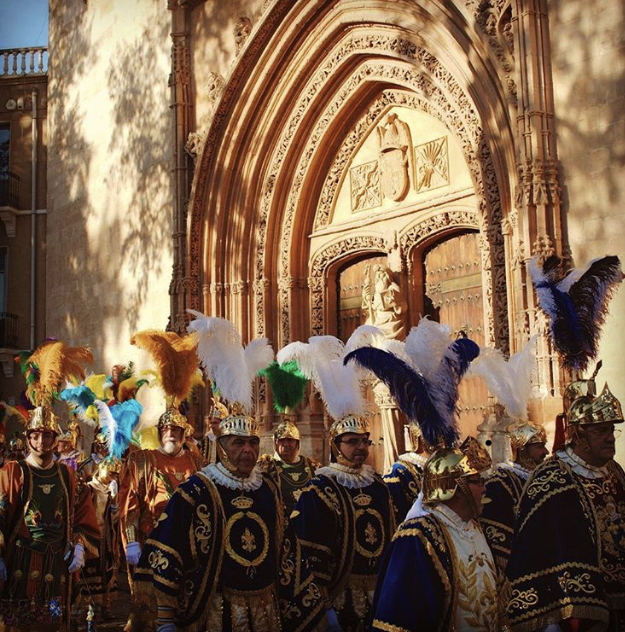 Los Armaos.